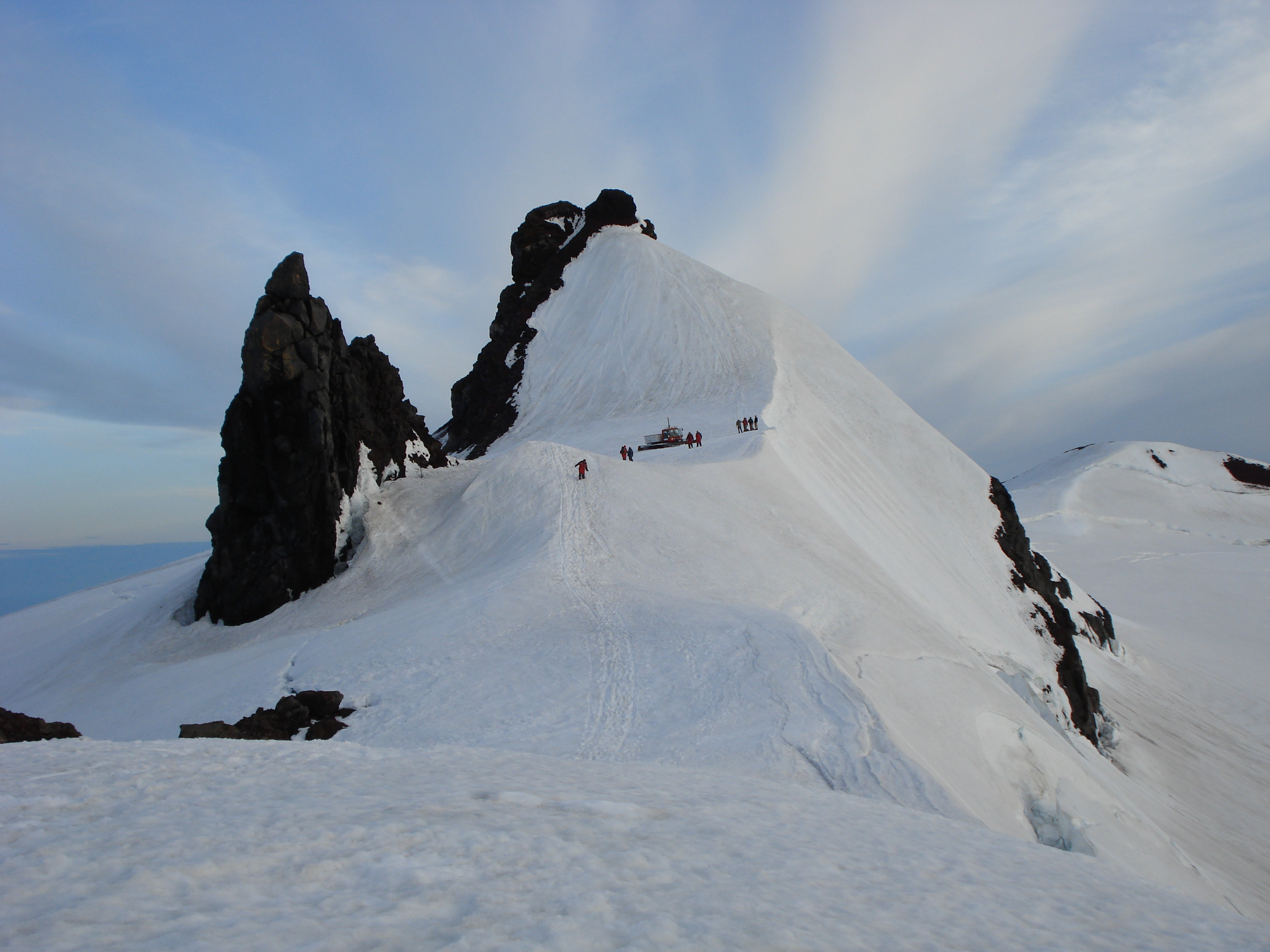 Snæfellsjökull, Iceland